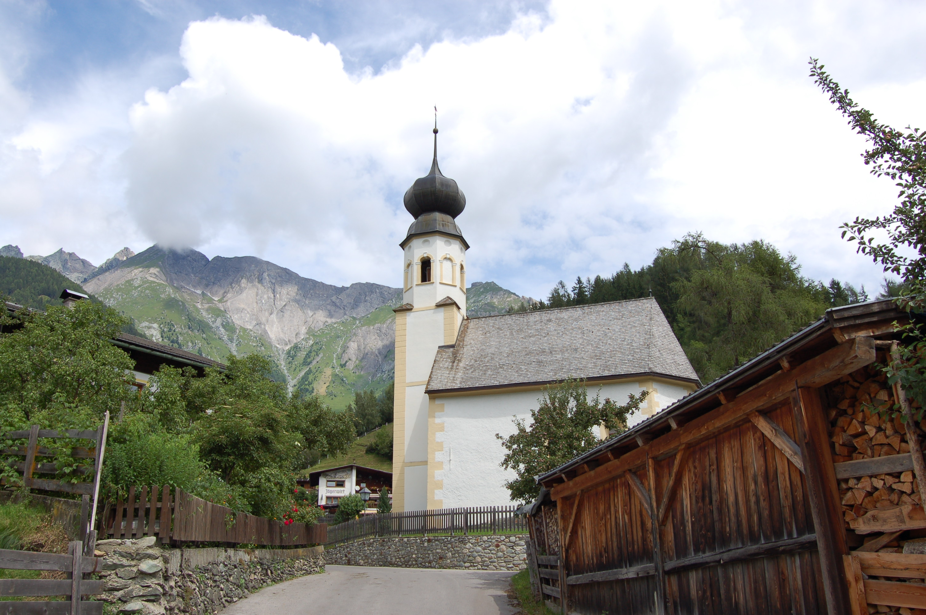 Die Mitteldorfer Kapelle von Außen in der Fraktion Mitteldorf, Gemeinde Virgen (Osttirol)